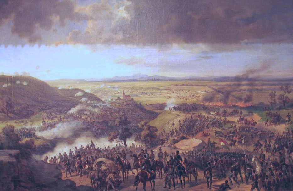 Der Entsatz der Festung Komorn während der Revolution 1848/49 in Ungarn